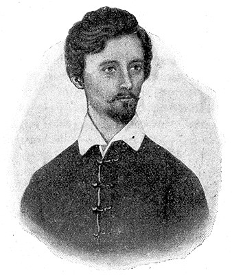 Petőfi Sándor 1846-ban (Tyroler József metszete Barabás Miklós rajza alapján)